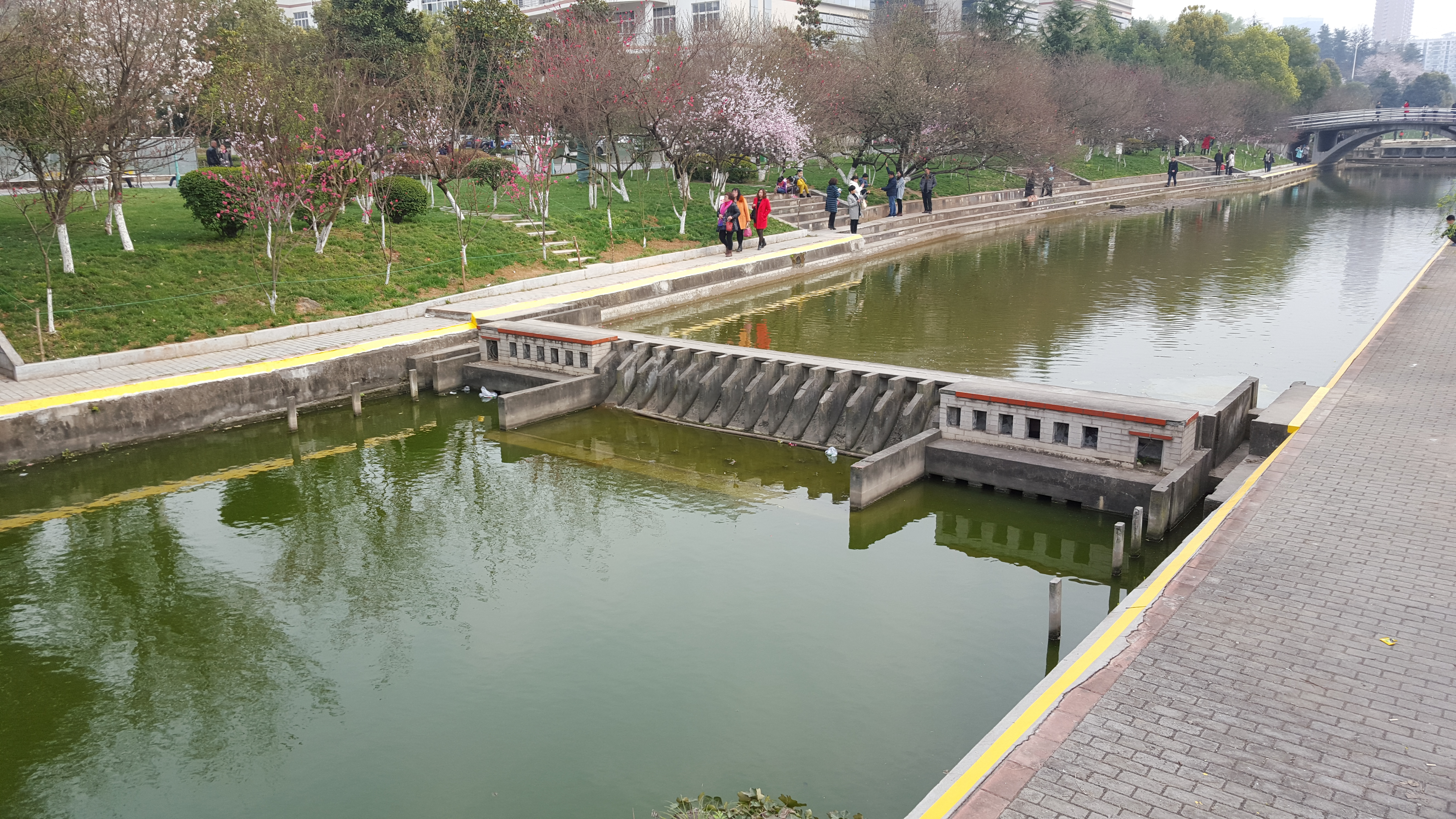 三峡大学求索溪的大坝微缩景观